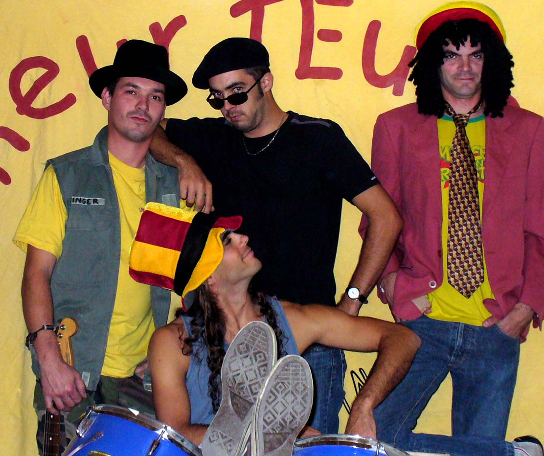 Le groupe de rock festif Limeur TEutche, originaire de Saint-Jean-d'Angély (Charente-Maritime), en 2009